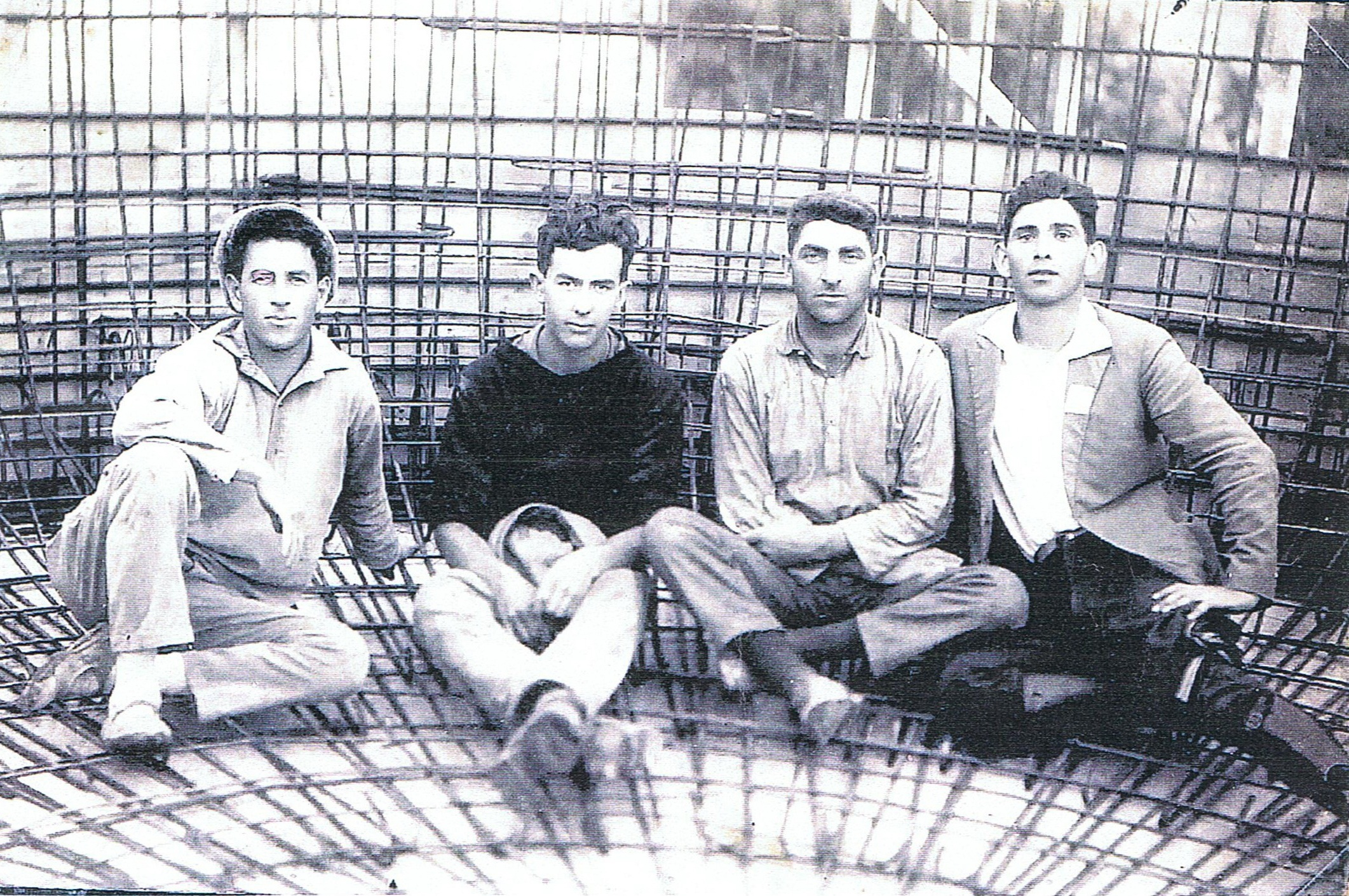 יצחק אלחנן חסקין היה ממייסדי כפר ביל"ו חבר בוועדה המרכזת של הועד הפועל של ההסתדרות הכללית ושימש גם כגזבר ההסתדרות בתמונה חסקין שלישי מימין בחולצה השחורה עם חבורת פועלים